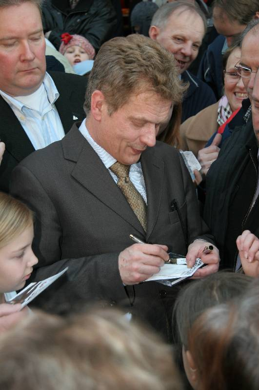 Sauli Niinistö antamassa nimikirjoitusta.